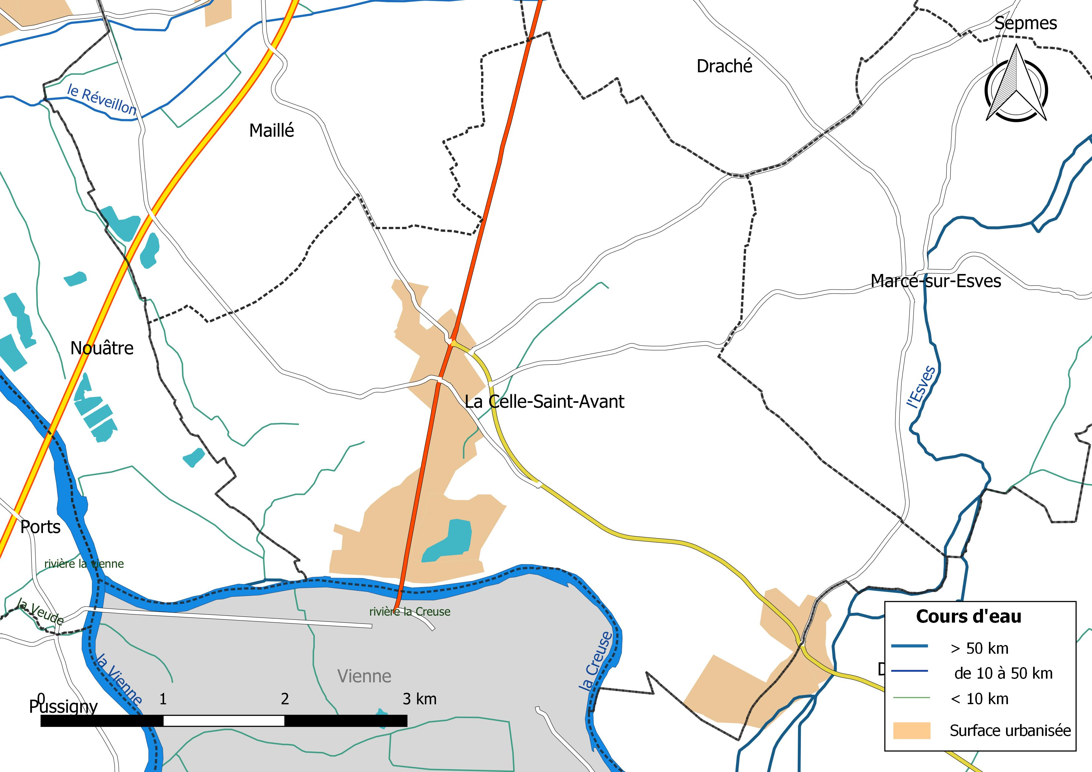 Carte du réseau hydrographique de la commune de La Celle-Saint-Avant (France).